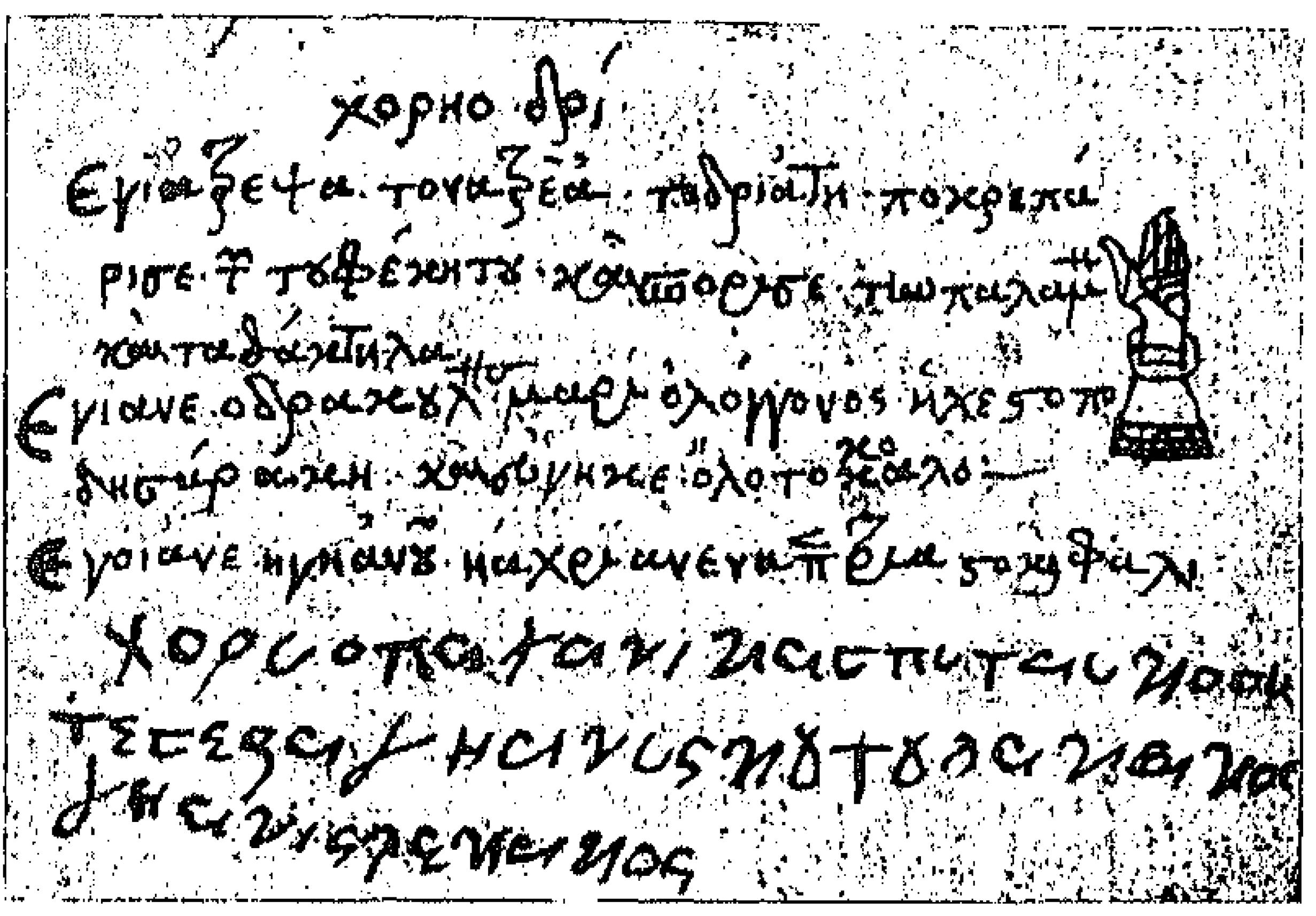 Πανομοιότυπο του χειρόγραφου του Παπαδάκη